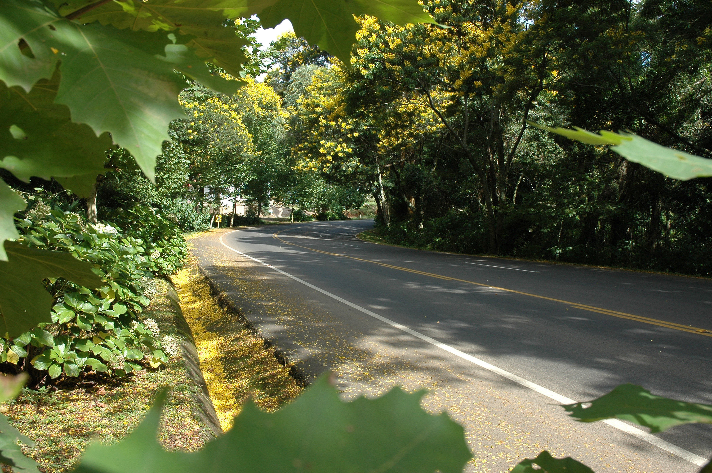 Rota da Inovação